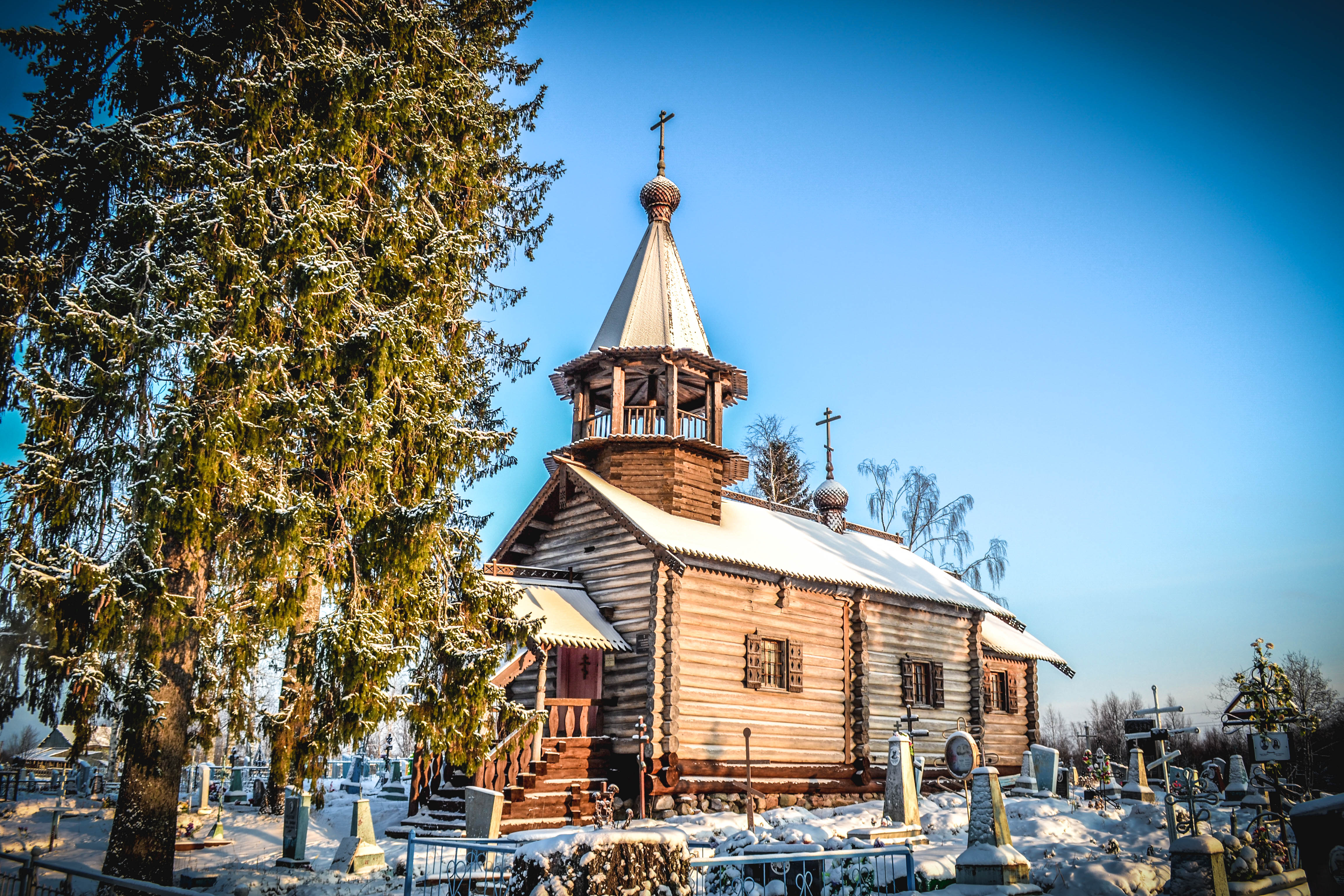 Посад, Церковь Афанасия Великого